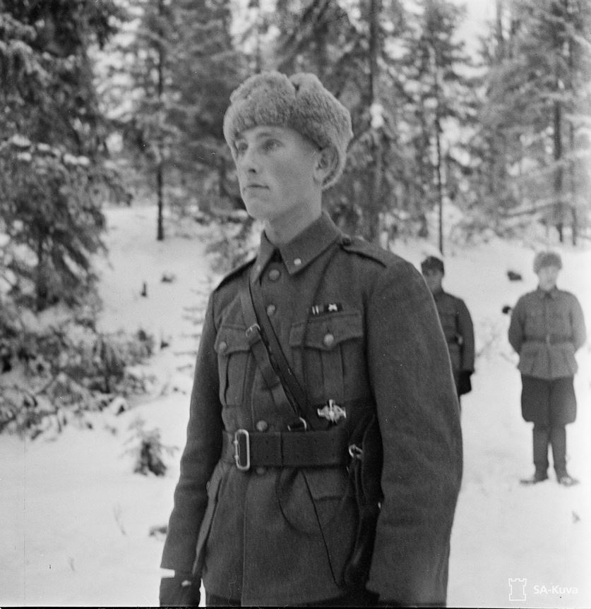 Pentti Iisalo 16.11.1941